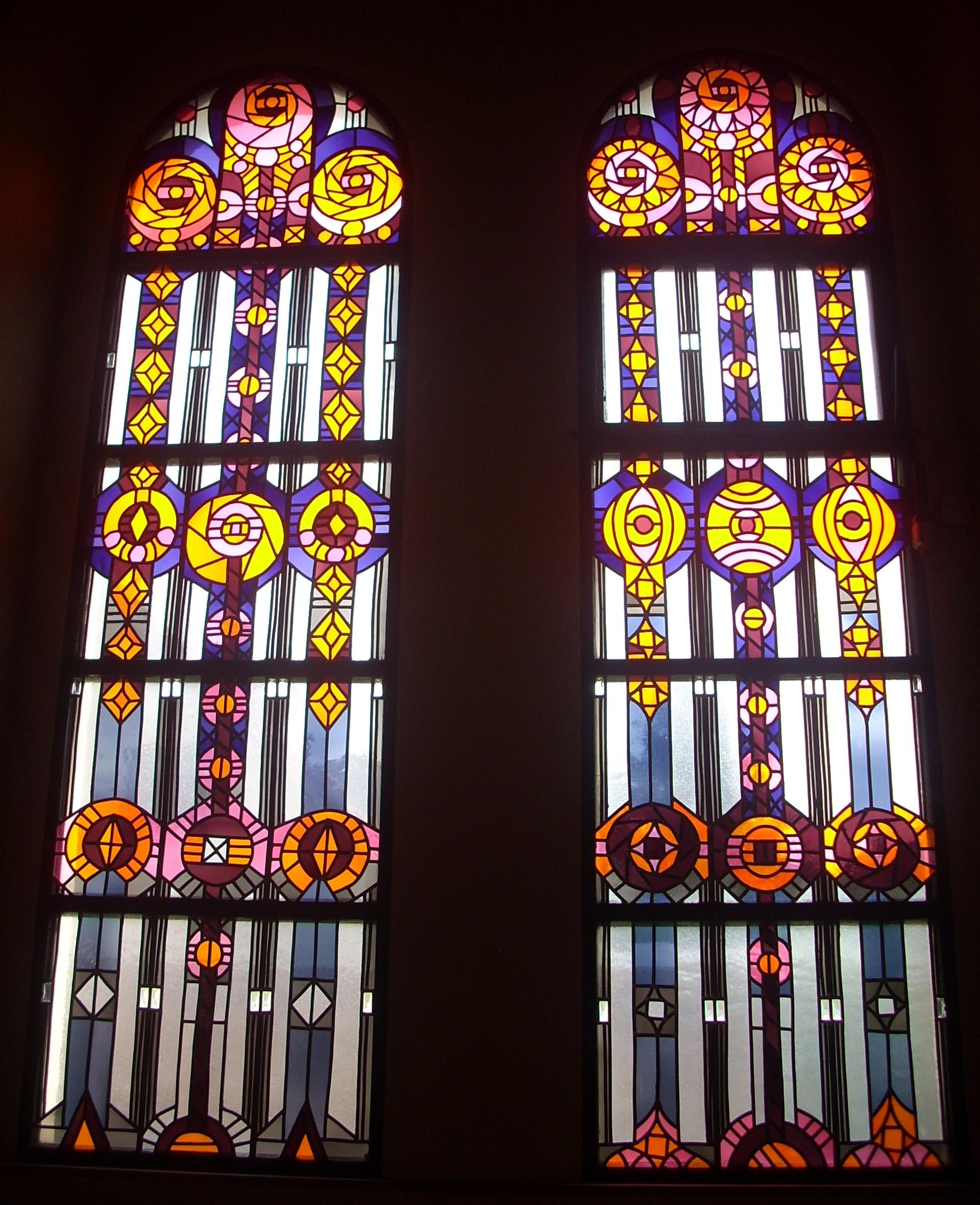 St. Mariä Himmelfahrt Westfeld, Fenster mit Rosenmotiv